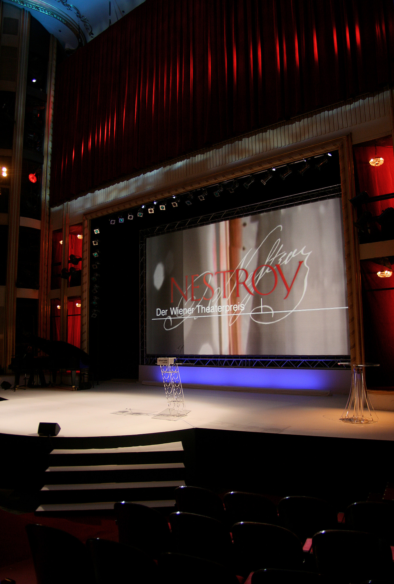 Die Bühne des Burgtheaters in Wien am Abend der Verleihung des Nestroy-Theaterpreises 2010.